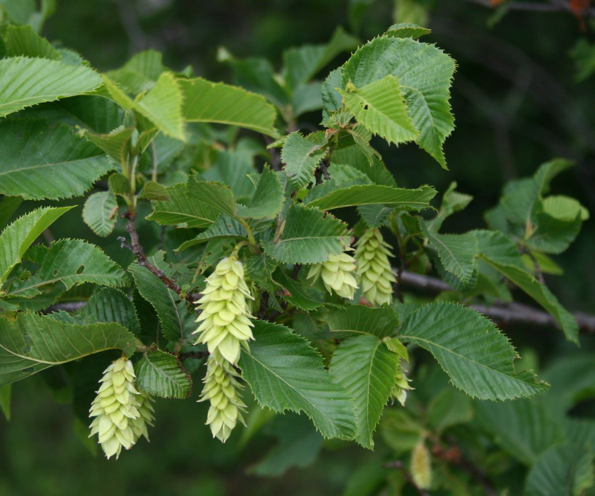 Ostrya carpinifolia, Birkengewächse (Betulaceae) - Italien/Italia/Italy: Friuli-Venezia Giulia, Prov. Trieste, Rilkeweg/Sentiero Rilke von Sistiana nach Duino